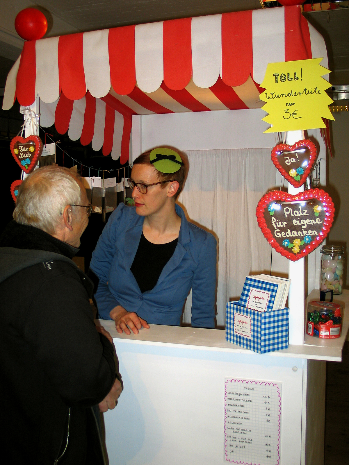 Im Gespräch: Professor Peter Redeker und die Künstlerin Vera Burmester, die im Kunst-Kiosk während der Vernissage der Art(f)air 2012 , Messe für zeitgenössische Kunst in Hannover unter anderem Lebkuchenherzen mit "Platz für eigene Gedanken" anbot ...